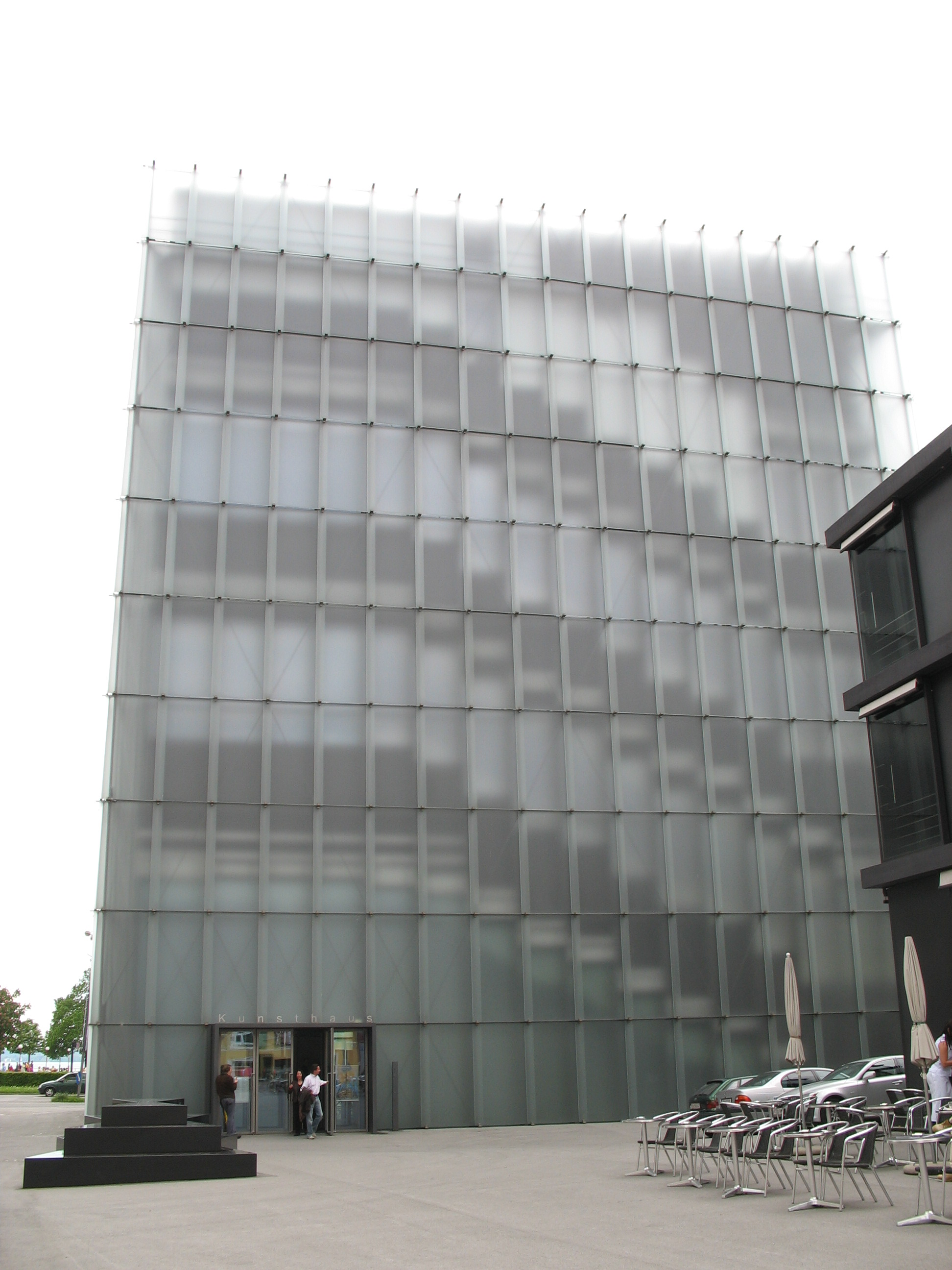 Kunsthaus Bregenz, 2006